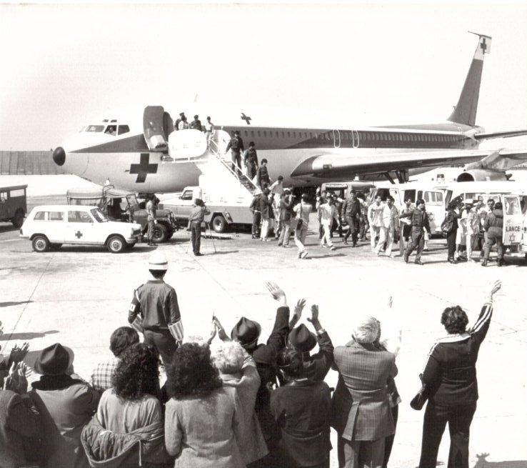 שחזור חזרת שבויי מלחמת יום הכיפורים מתוך הסרט החורף האחרון של ריקי שלח צלום יוני המנחם (2)